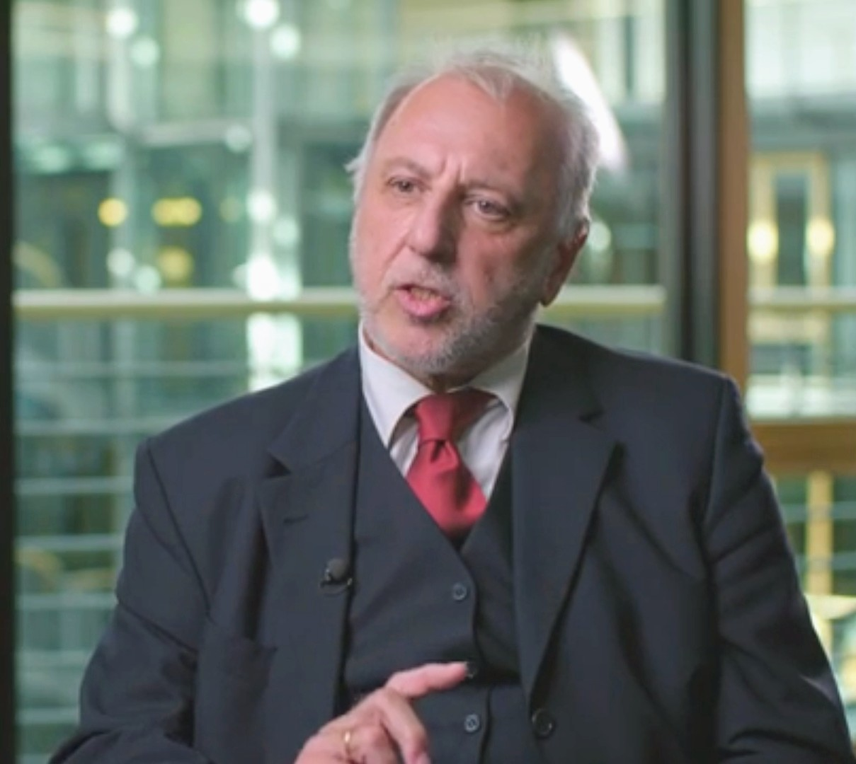 Drei Hochschulen haben den Wettbewerb "Data Literacy Education" von Stifterverband und die Heinz Nixdorf Stiftung gewonnen. Wer sind die drei und was haben sie vor, um ihren Studierenden einen geschulten Umgang mit Daten zu vermitteln? Mit O-Tönen von: Burkhardt Funk, Professor für Wirtschaftsinformatik, Leuphana Universität Lüneburg Volker Meyer-Guckel, stellvertretender Generalsekretär des Stifterverbandes (Jurymitglied) Peter Baumgartner, Professor für Technologieunterstütztes Lernen und Multimedia, Donau-Universität Krems, Österreich (Jurymitglied) Jana Lasser, Promovierende, Georg-August-Universität Göttingen und Max-Planck-Institut für Dynamik und Selbstorganisation Till Nagel, Professor für Visual Analytics, Hochschule Mannheim Weitere Videos zum Thema/ Watch also: Data Literacy Education an Hochschulen: Die Wettbewerbsjury Cathryn Carson: Data Literacy at Berkeley – Some Insights Chris Armbruster: Die Data Scientists von morgen Jede Woche neu beim Stifterverband: Die Zukunftsmacher und ihre Visionen für Bildung und Ausbildung, Forschung und Technik Autorin: Corina Niebuhr Produktion: Webclip Medien Berlin Redaktion: Michael Sonnabend, Nadine Bühring, Björn Quäck Videodesign: kreativekk.de